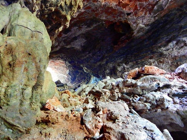 Carverna Mirabela/MG